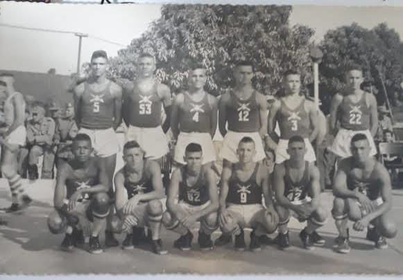 Atletas do Curso de Infantaria da ESA 1957, foto doada pelo ST Berbel, antigo aluno do Curso de Infantaria da ESA/1957, doada em 09 Out 2019